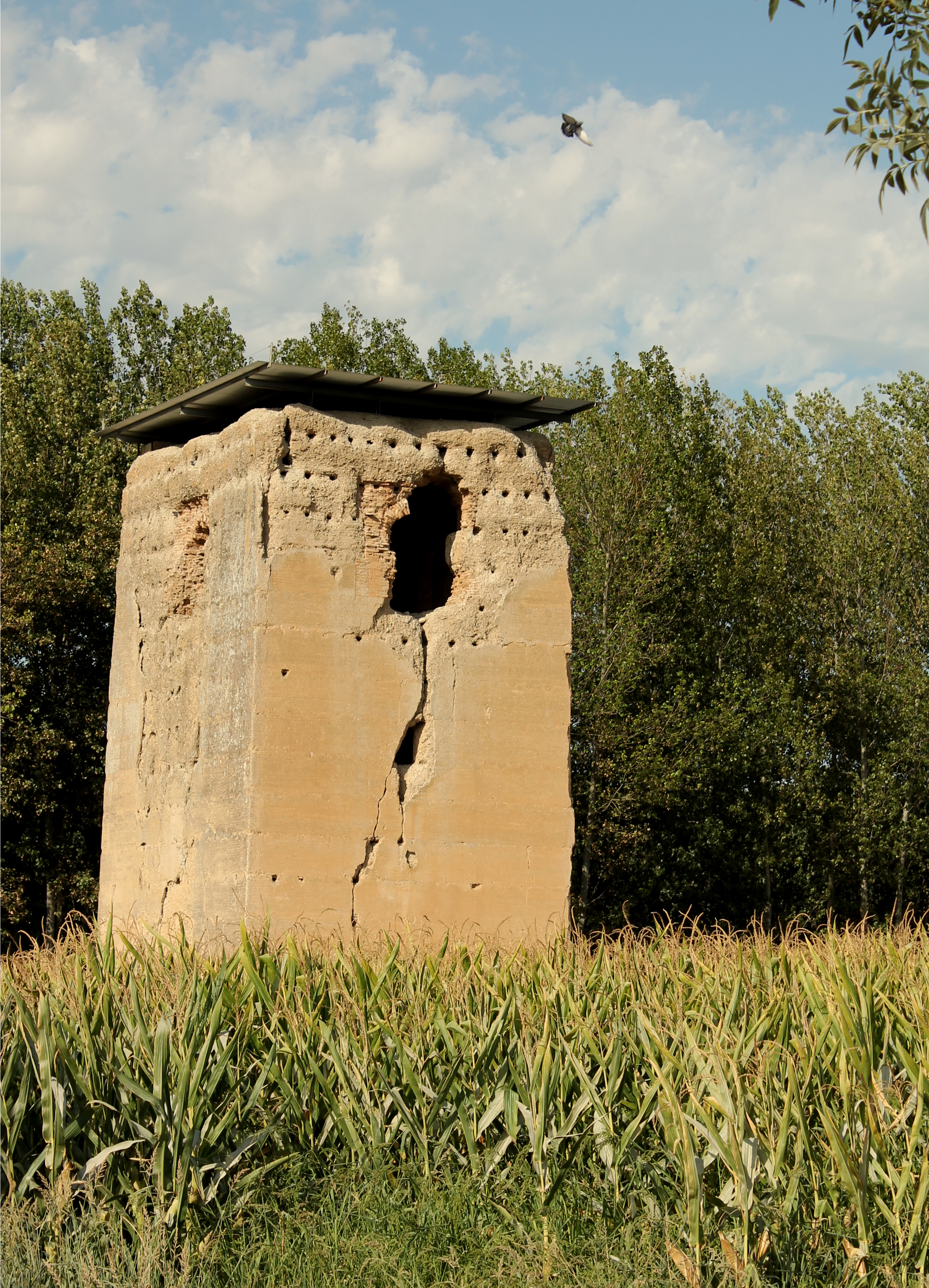 La torre entre cultivos